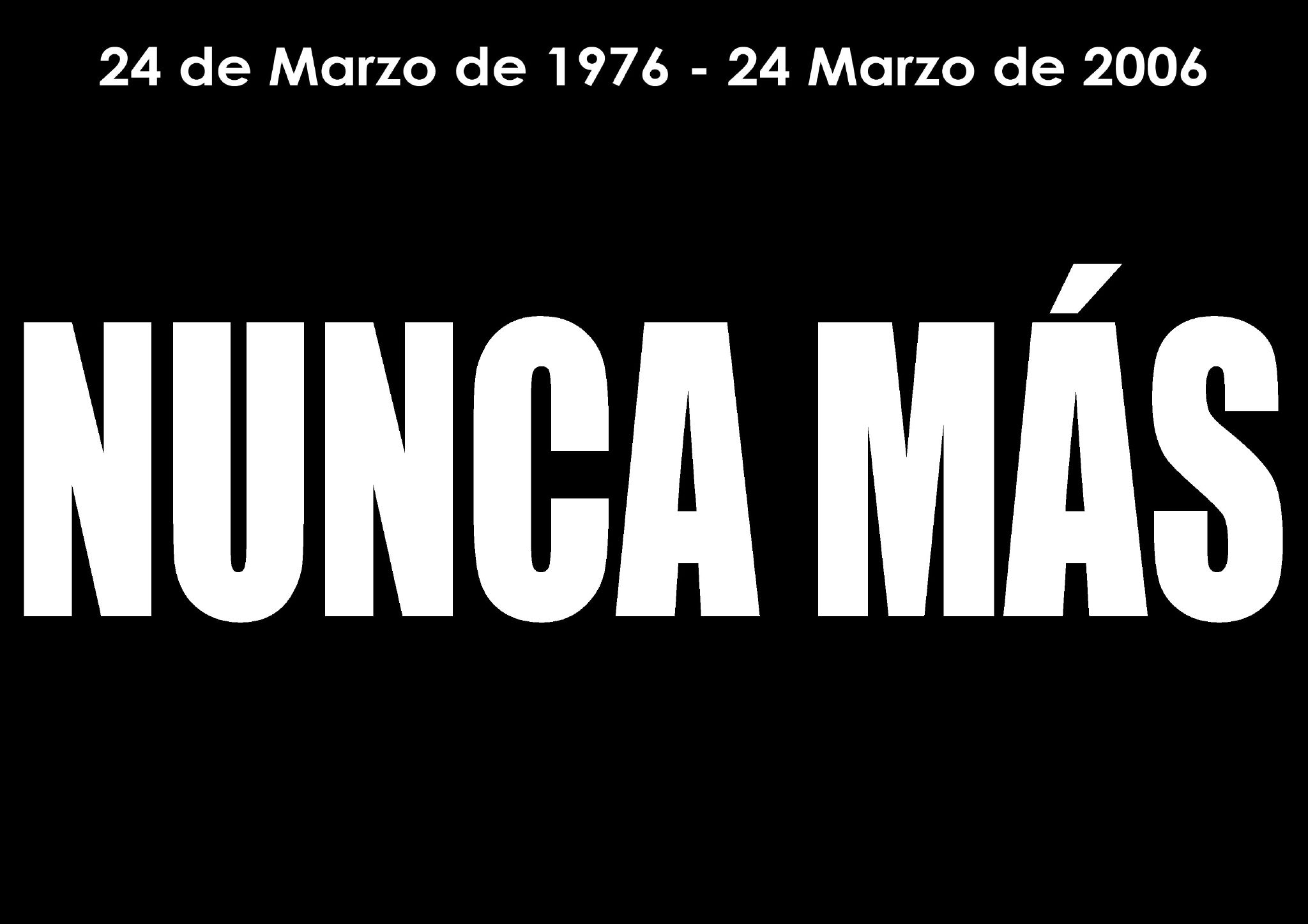 Loita dos organismos de dereitos humanos en Arxentina 30 anos despois.Nunca más!